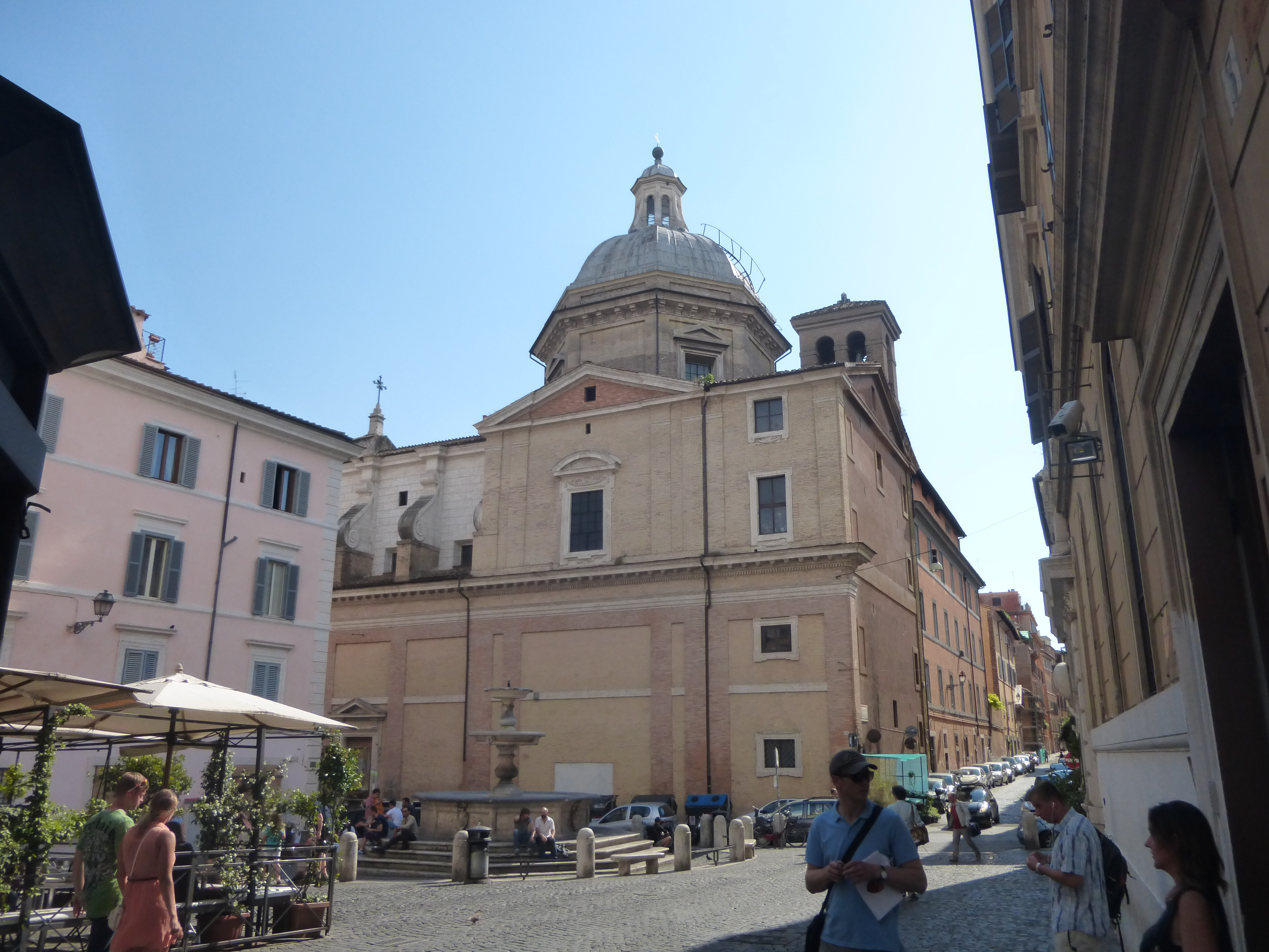 Roma, piazza della Madonna dei Monti. Di fronte il fianco della chiesa su via dei Serpenti e via Baccina.